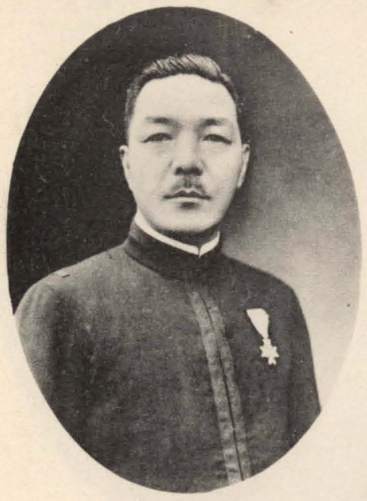 Bân-lâm-gú: 藤村寬太 Fujimura Kanta